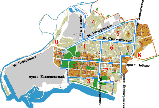 map